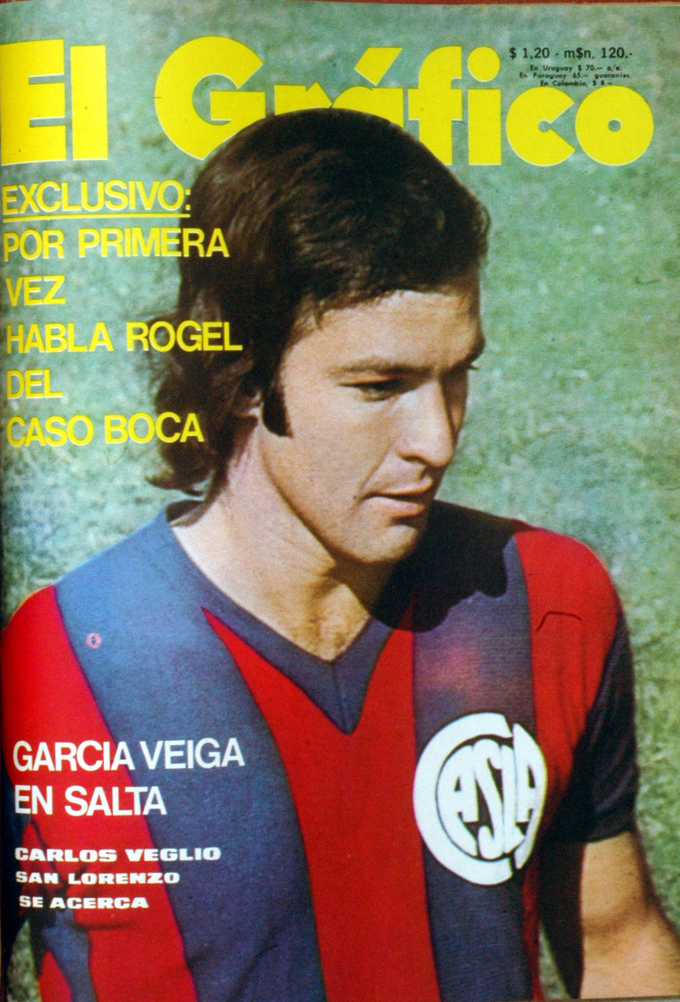 El Grafico del 20 de Abril de 1971. Edicion 2689